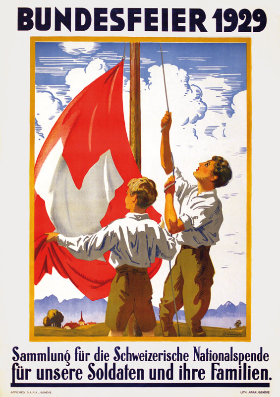 Poster Jules Courvoisier 1. August 1929